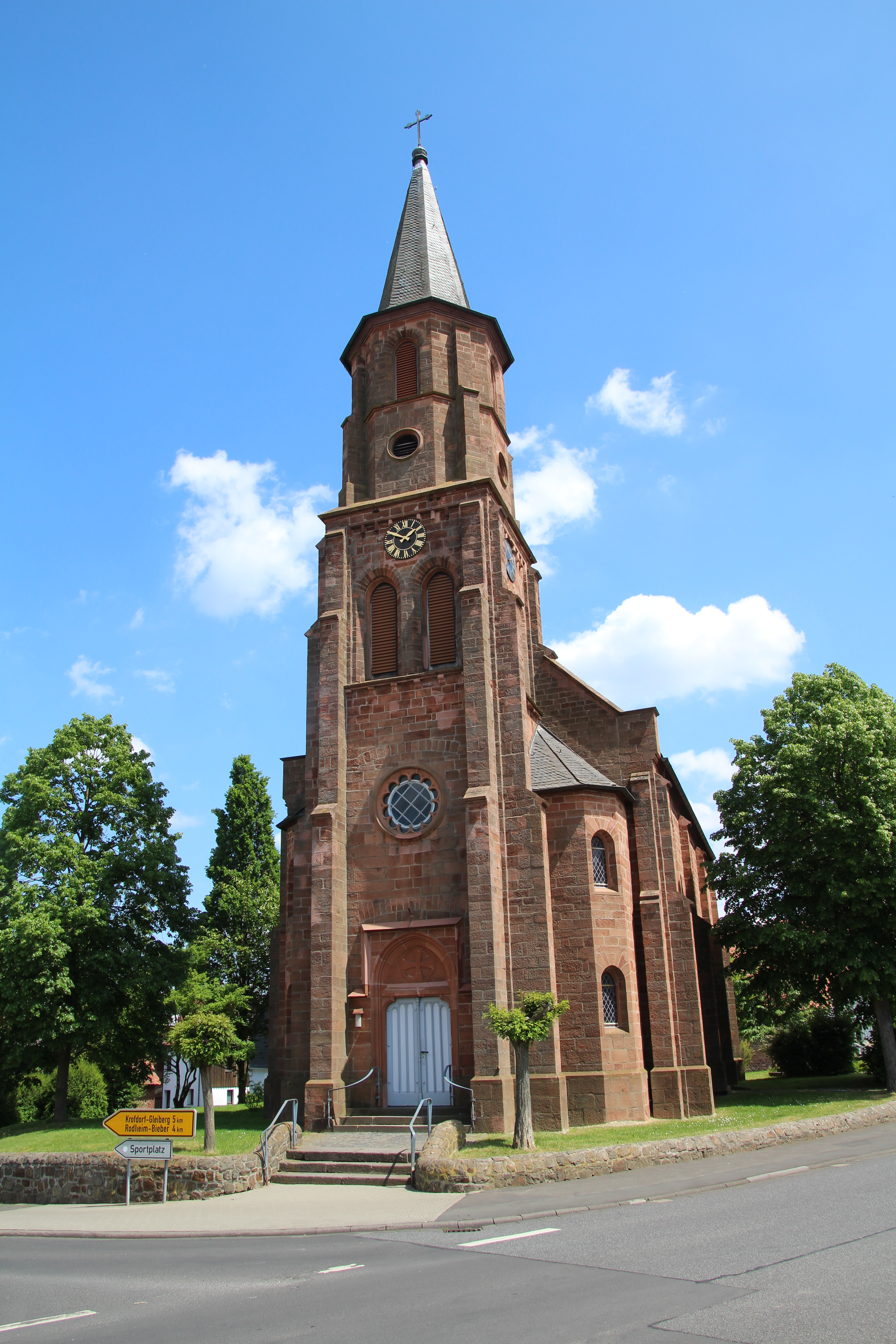 Kirche